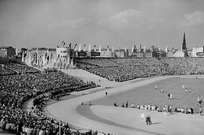 Original image description from the Deutsche FotothekBlick auf das Spielfeld und die Zuschauertribünen des Walter-Ulbricht-Stadions während eines Fußballspiels